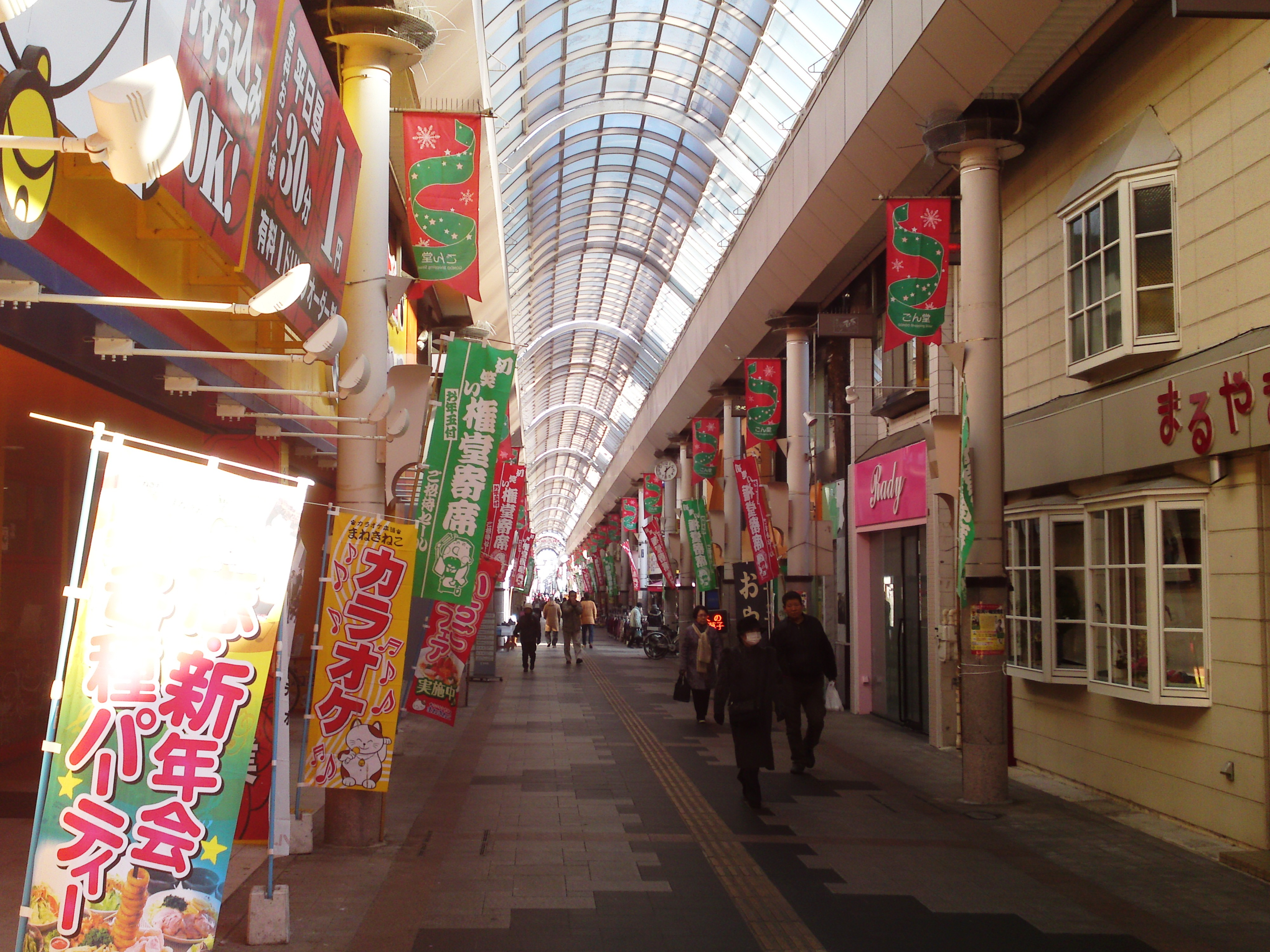 権堂アーケード中間部（長野市権堂町）